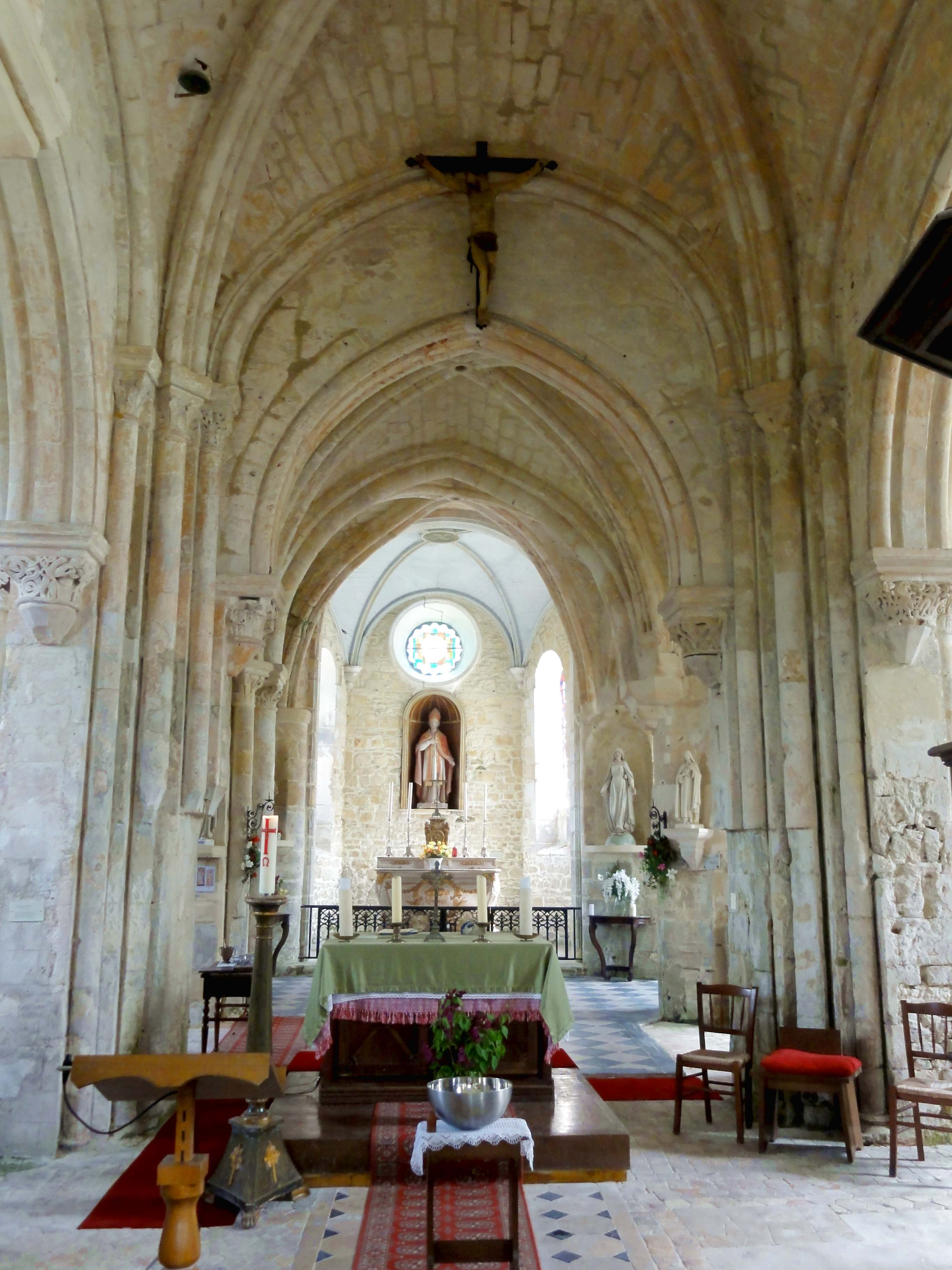 Intérieur de l'église - voir titre.